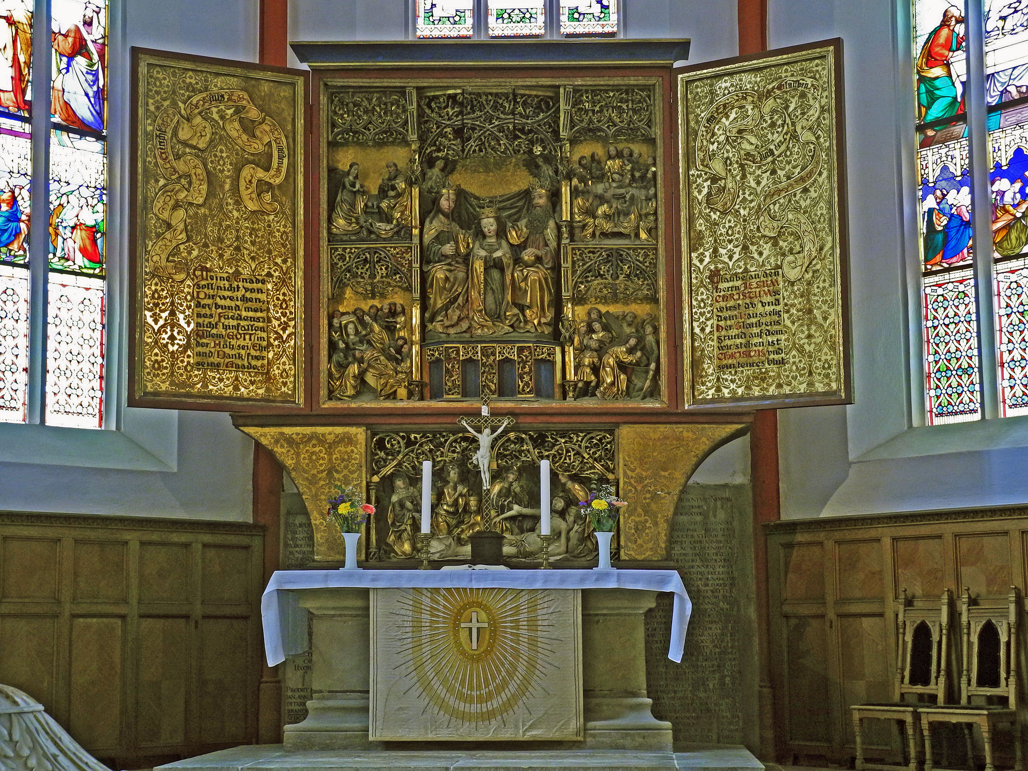 Frauenkirche Meißen: Flügelaltar